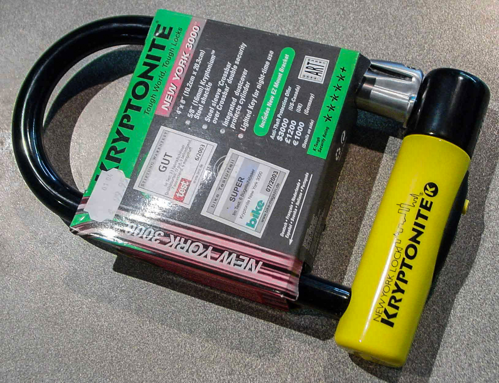 Antivol de vélo de marque Kryptonite modèle New York 3000.